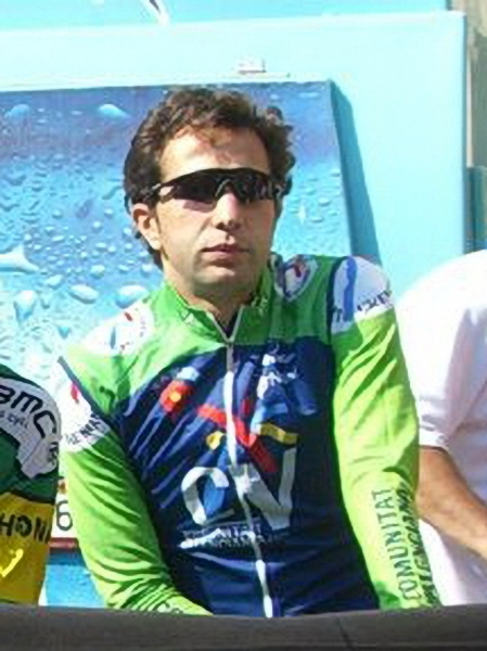 David Blanco, ciclista de Galiza.